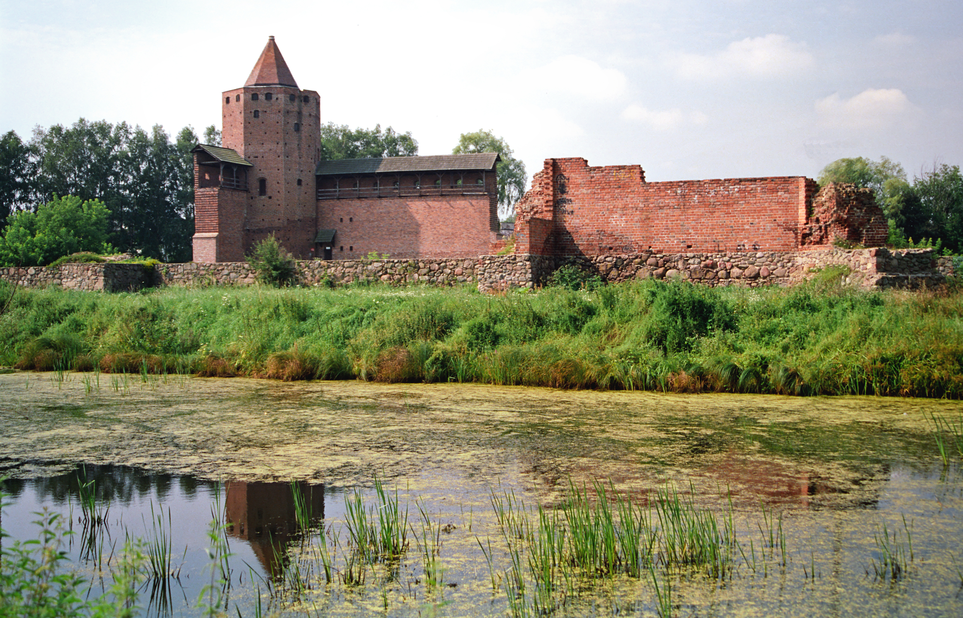 Poland, Rawa Mazowiecka Castle